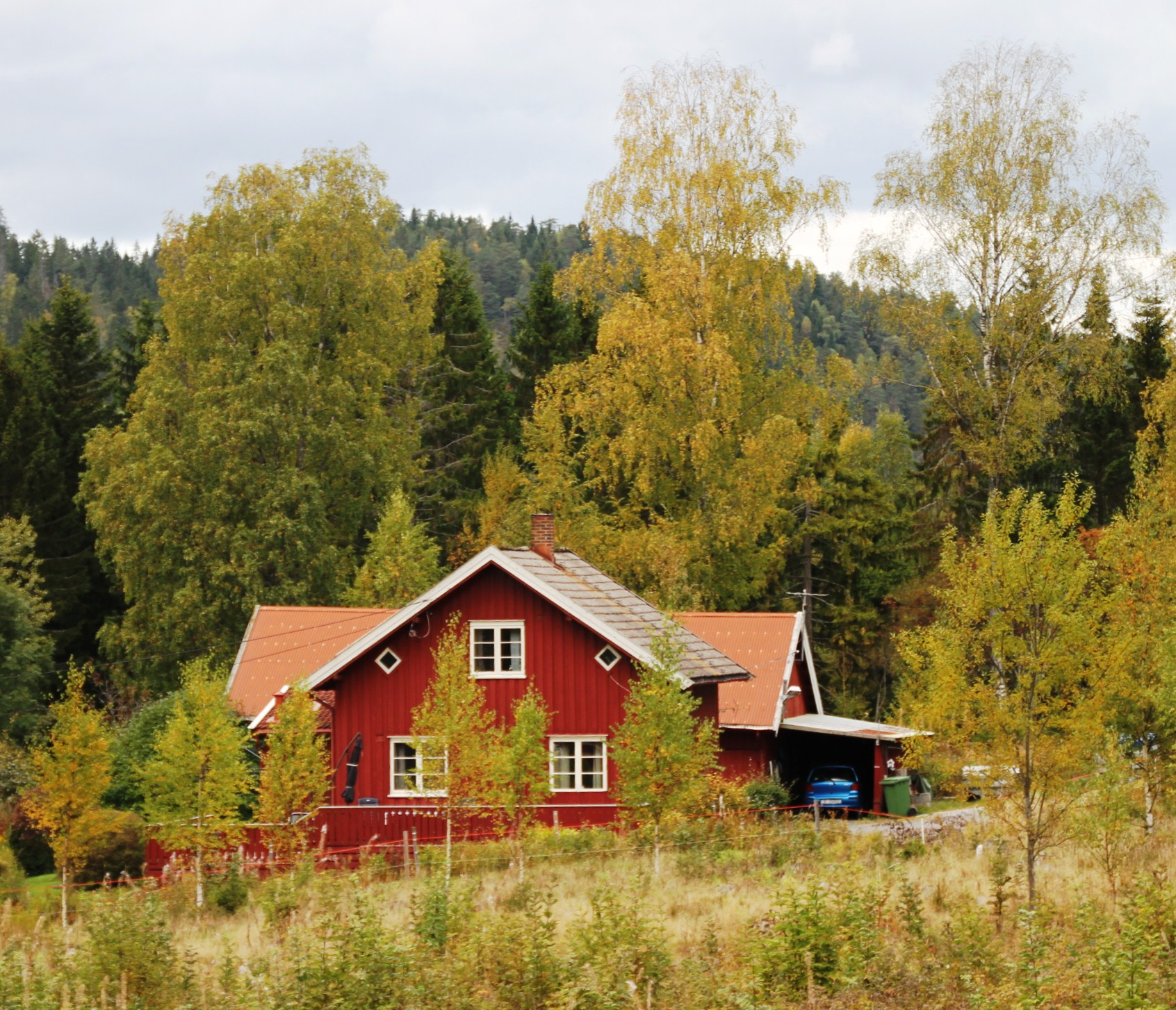 Zinober gård i Sørkedalen, bydel Vestre Aker i Oslo.